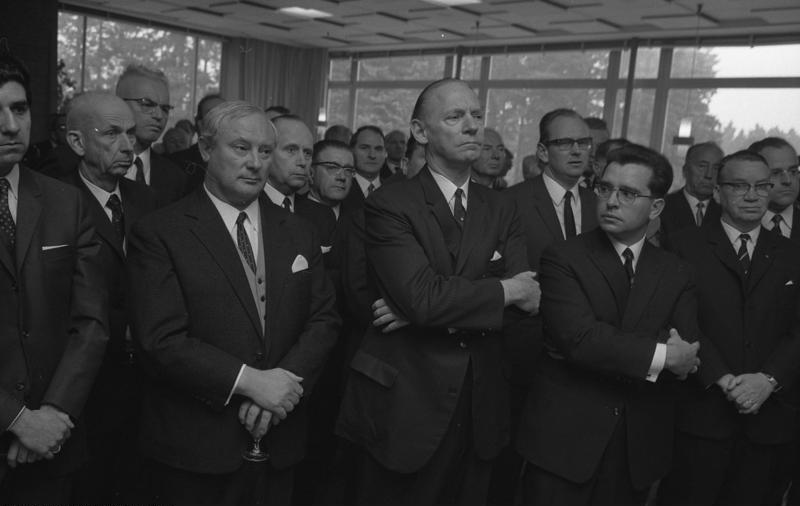 20 Jahre NATO. Bundeswehrparade auf dem Nürburgring. (3. v. l.: Bm Georg Leber, [Verkehr])